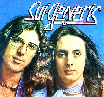 Foto a color del conjunto argentino Sui Generis.